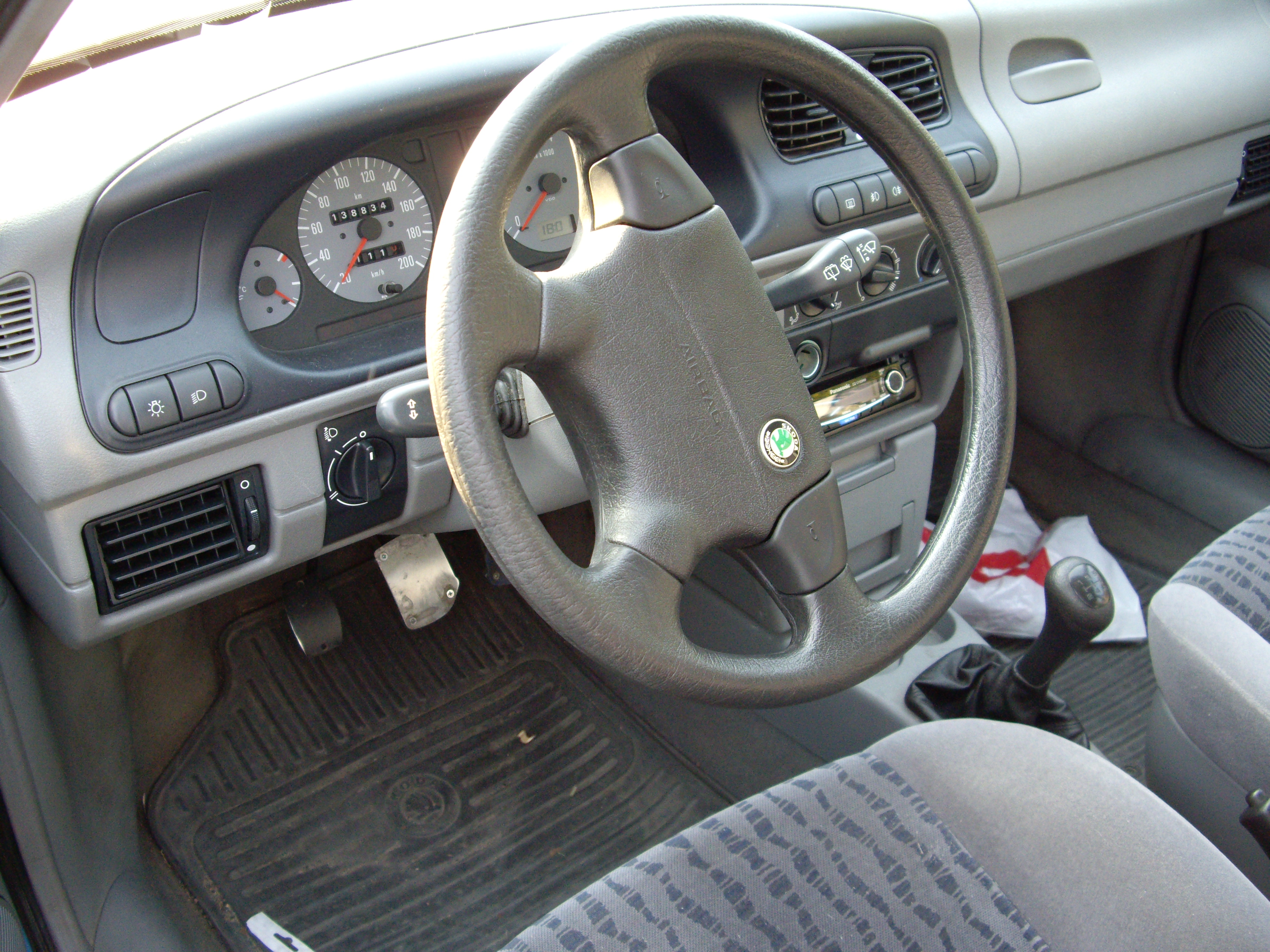 En bild på hur Skoda Felicia ser ut inuti.